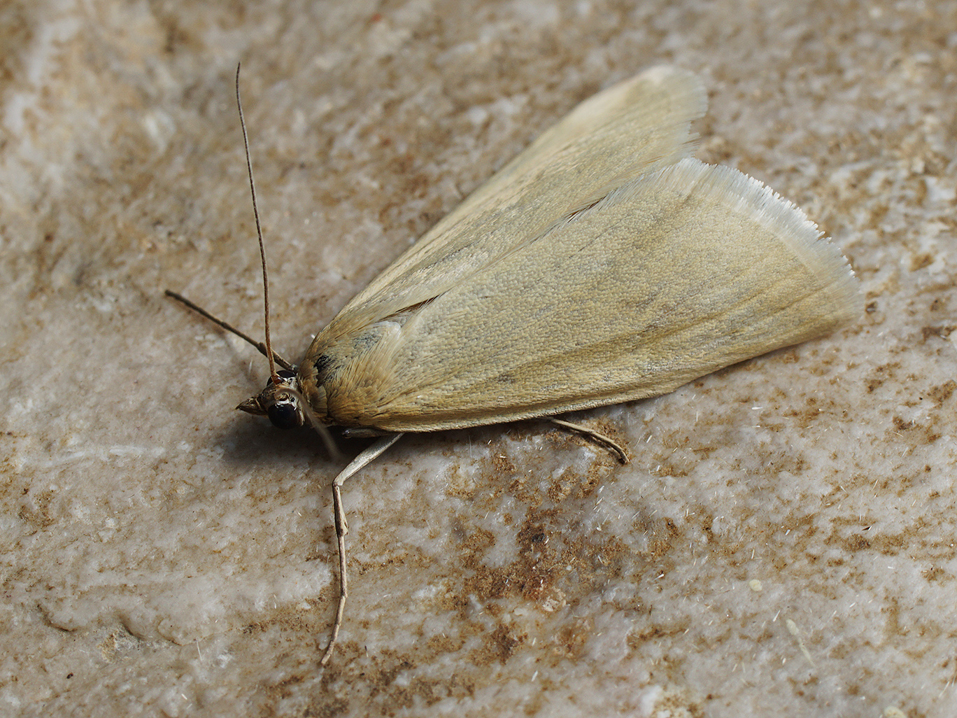 Exemplar found: Russia, Moscow Oblast, Odintsovsky District, near village Ryazan, 11.06.2018, in grass, days МО, Одинцовский р-н, окрестности деревни Рязань, 11.06.2018, в траве, днём